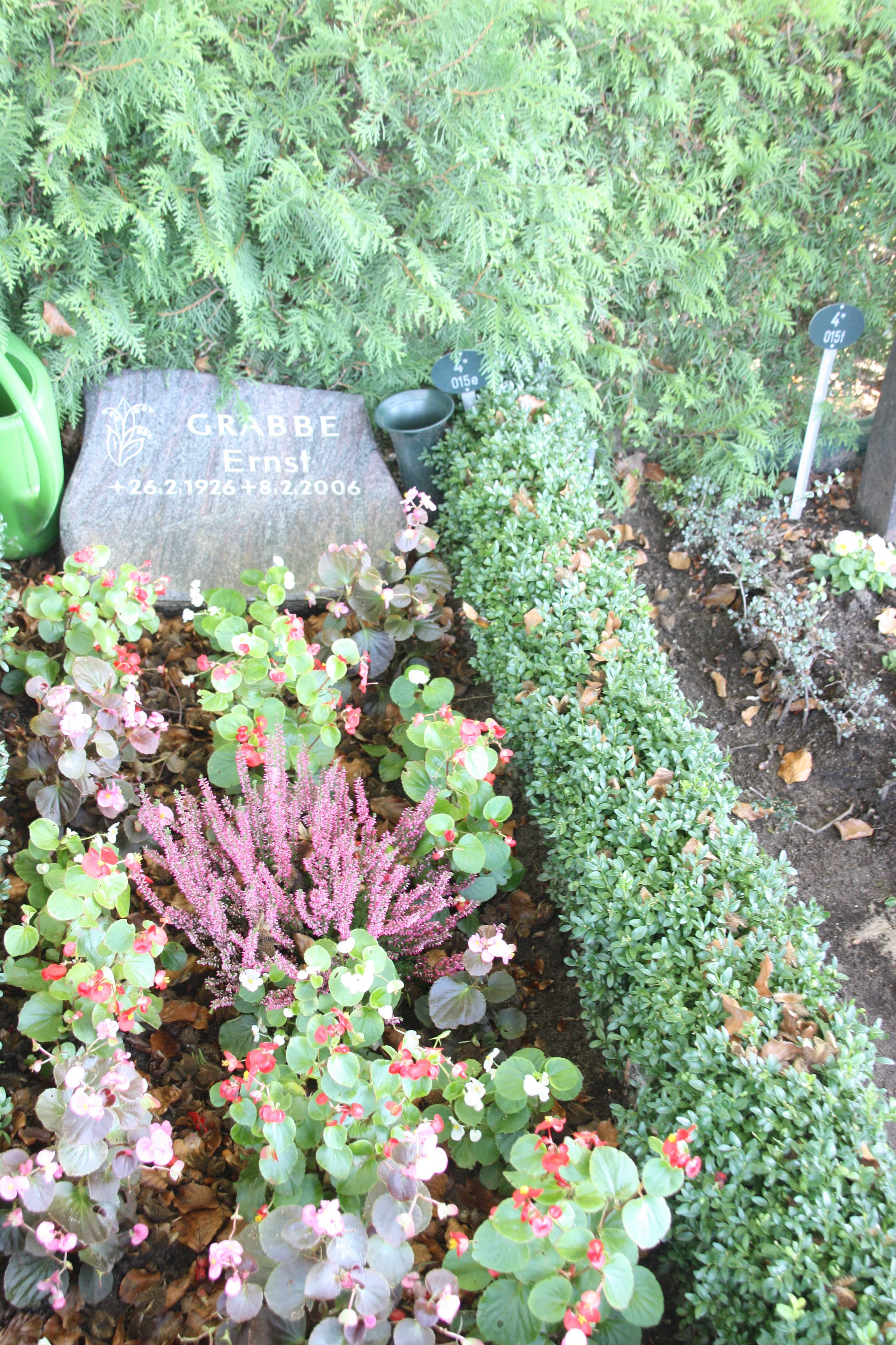 Grabstein Ernst Grabbe